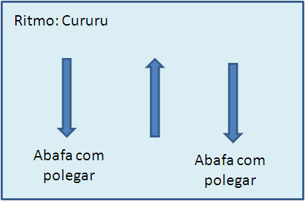 Diagrama simplificado para viola caipira do ritmo Cururu